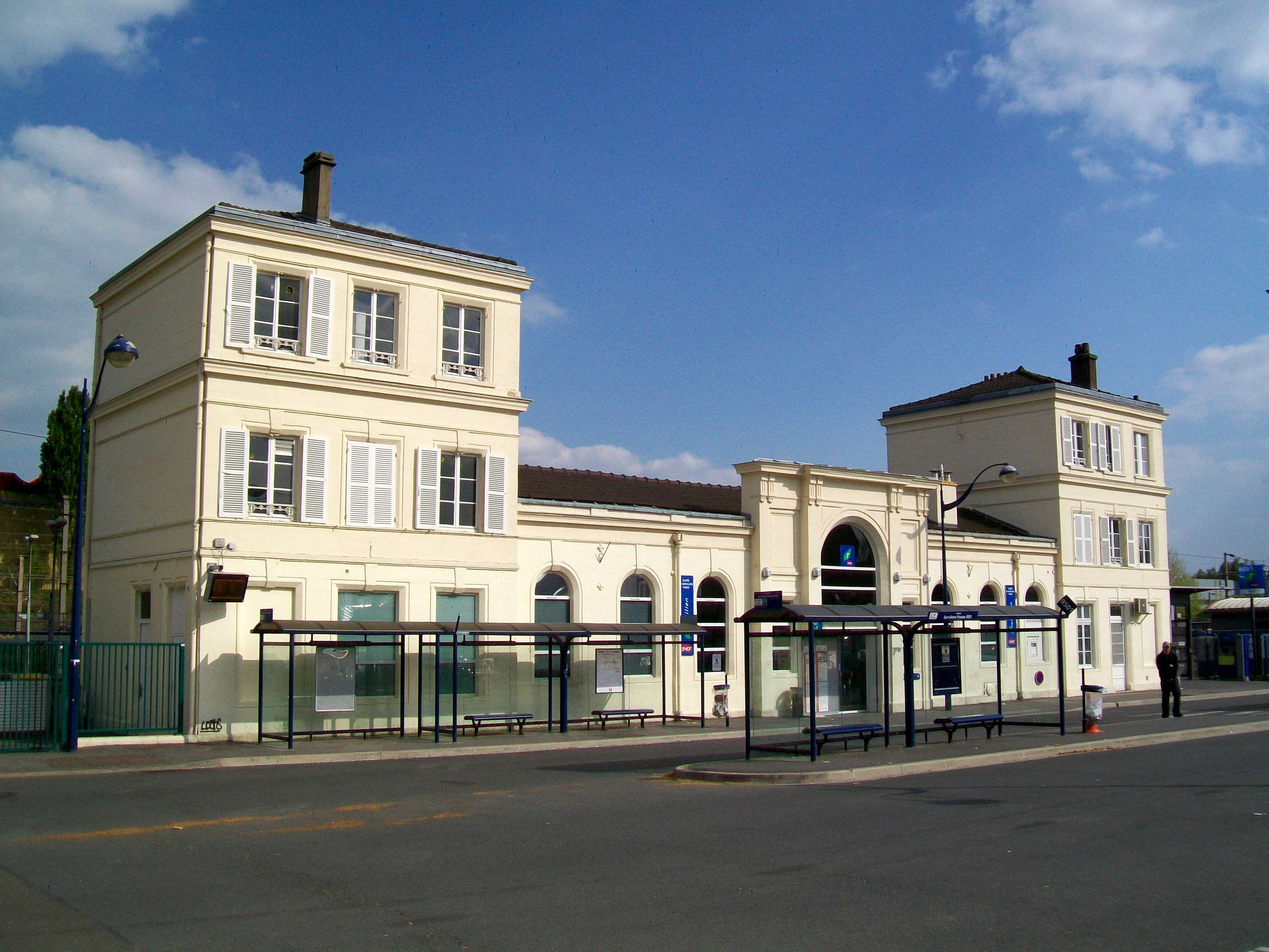 Gare de Survilliers - Fosses, Val-d'Oise, France : Le bâtiment voyageurs après la restauration.